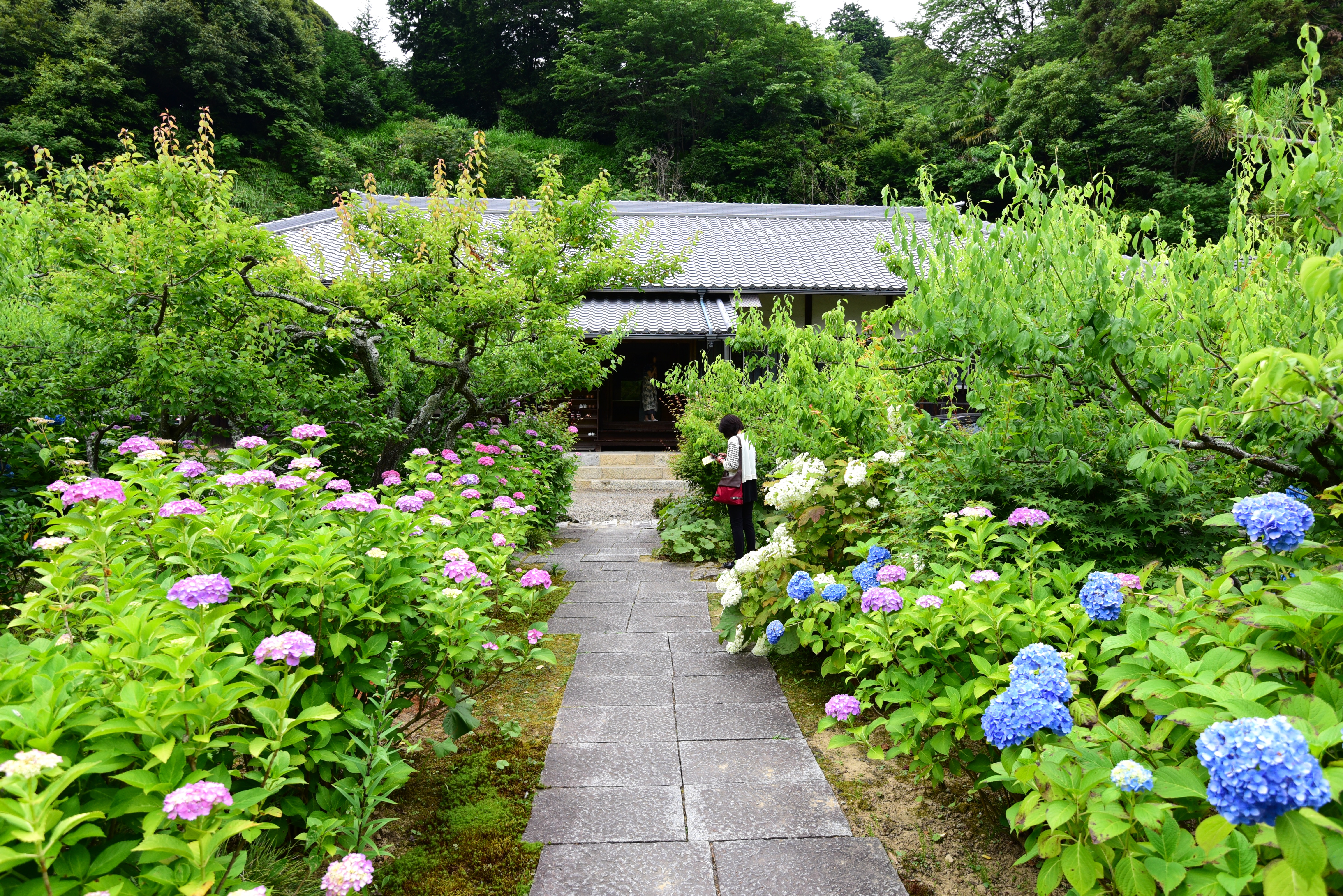 本堂とアジサイ